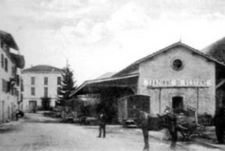 Vestone